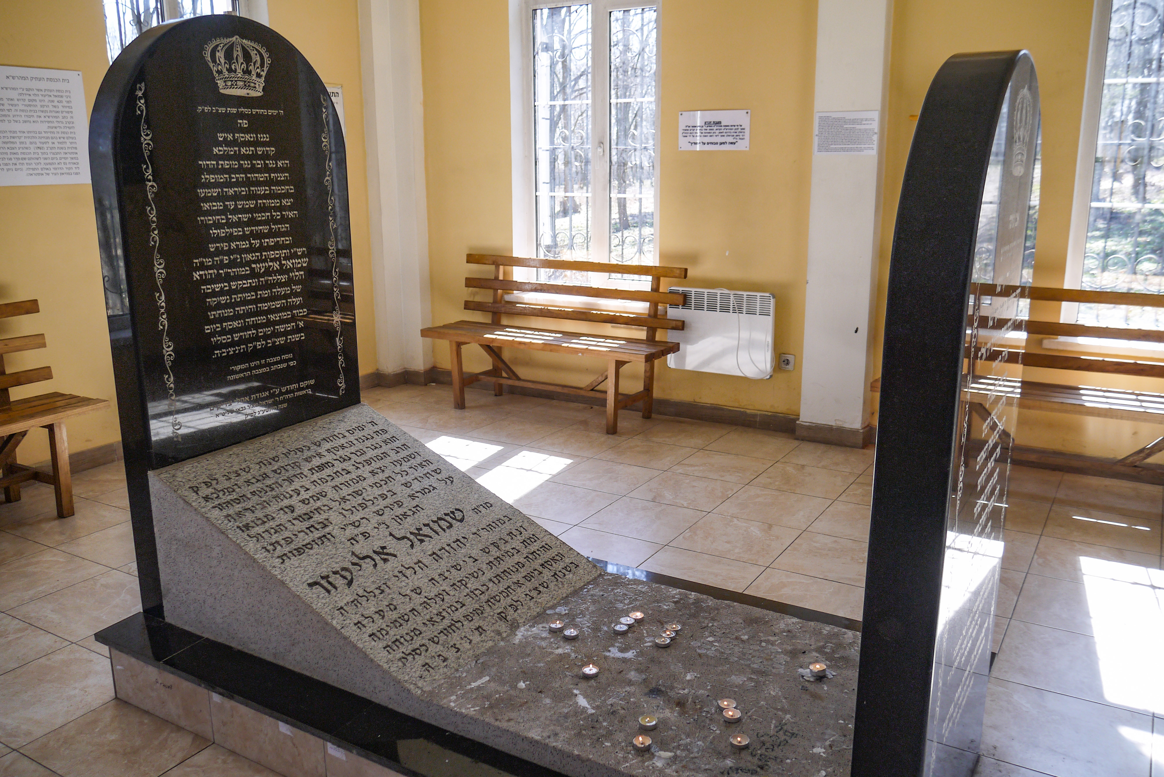 Могила Самуіла Едельса, Острог, колишнє єврейське кладовище